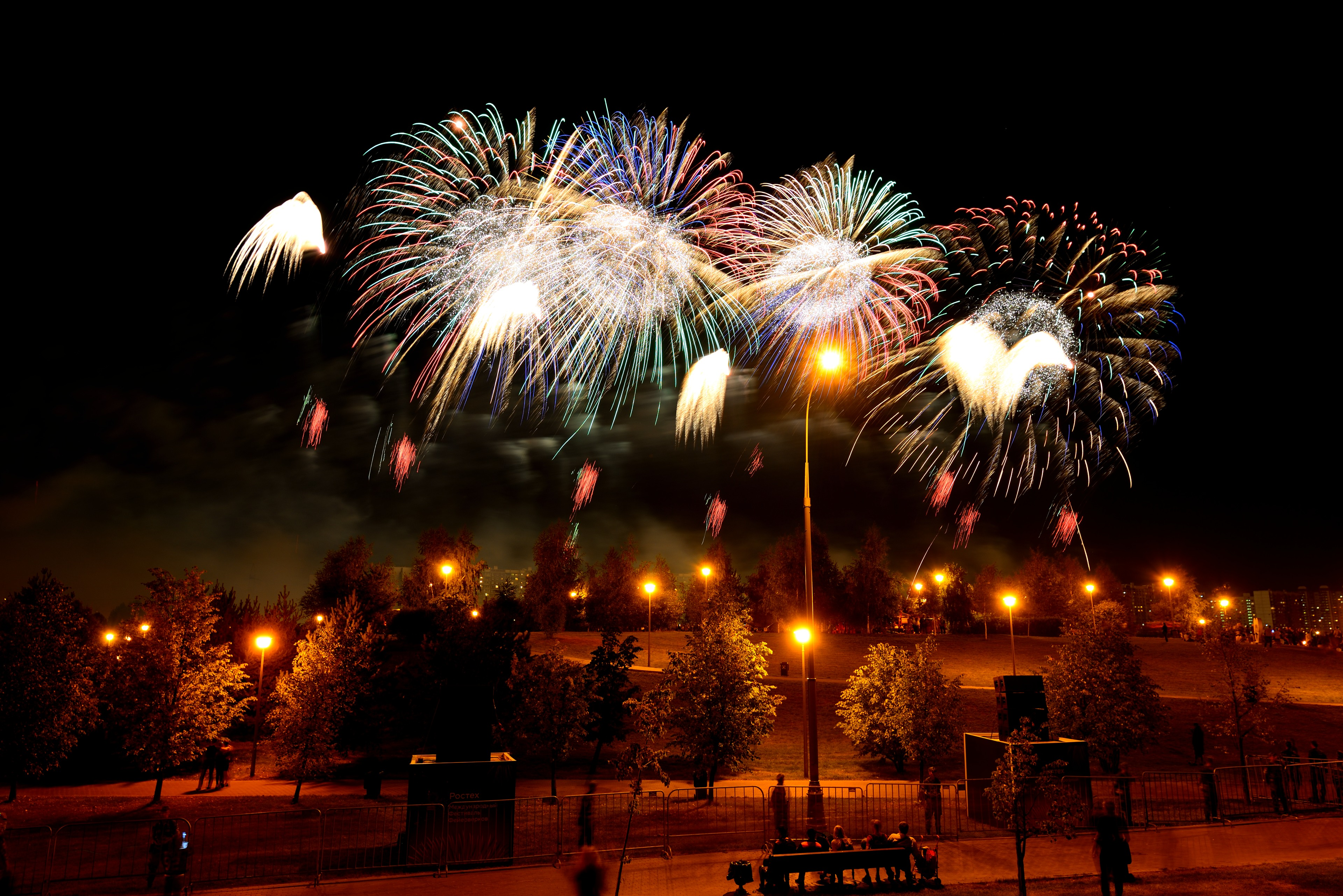 Фестиваль фейерверков в Москве, Братеево, 2018-08-18